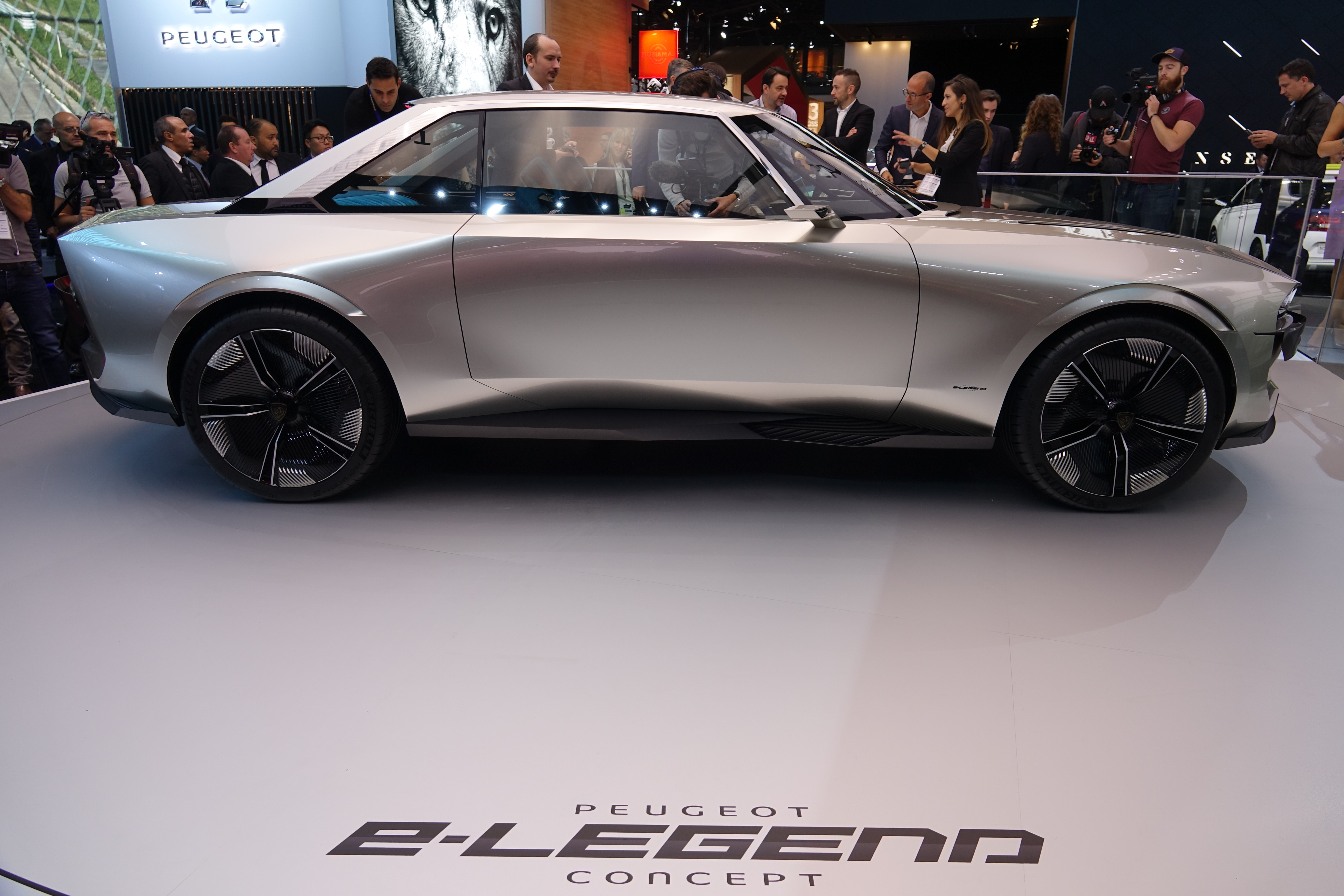 Peugeot e-Legend-Mondial de l'Auto 2018